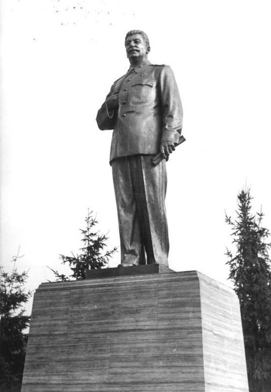 ADN-ZB-Quaschinski-Hö-4.8.1951 Berlin: Das Stalin-Denkmal vor der Sporthalle in der Stalinallee (heute Karl-Marx-Allee).